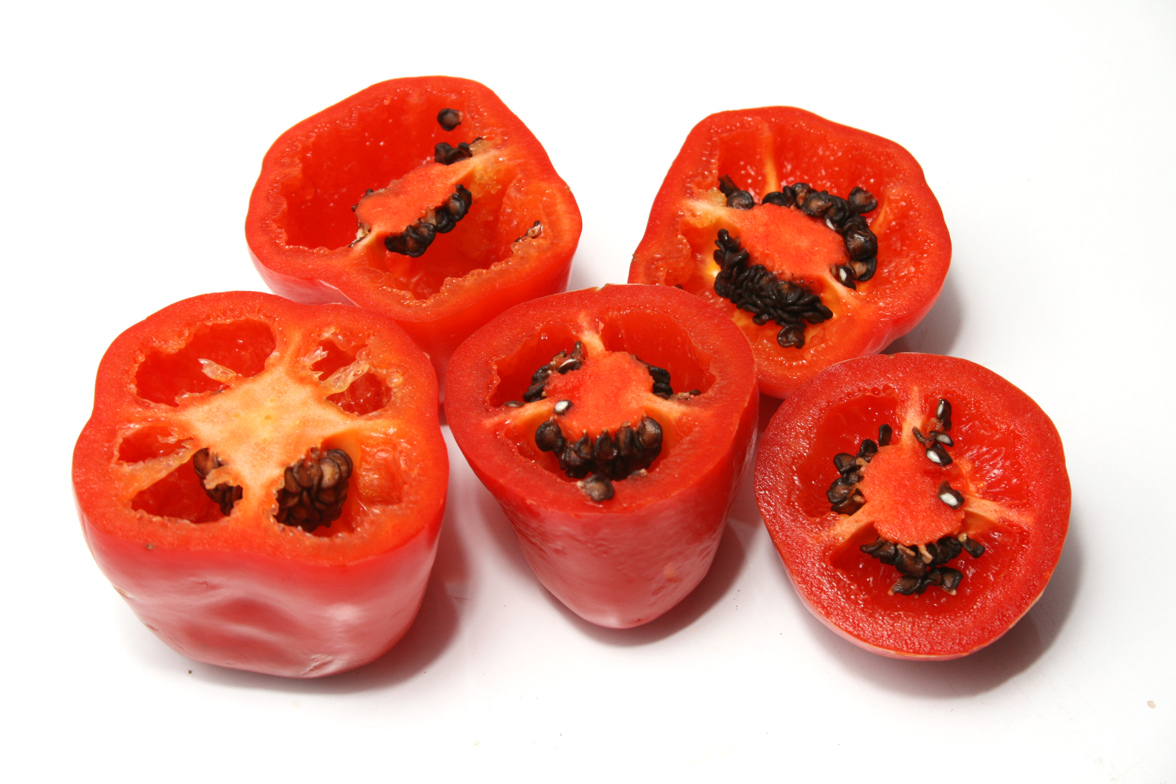 Interior del Rocoto